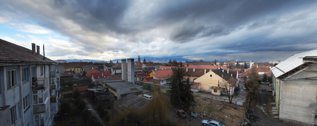 Gyergyószentmiklósi panoráma